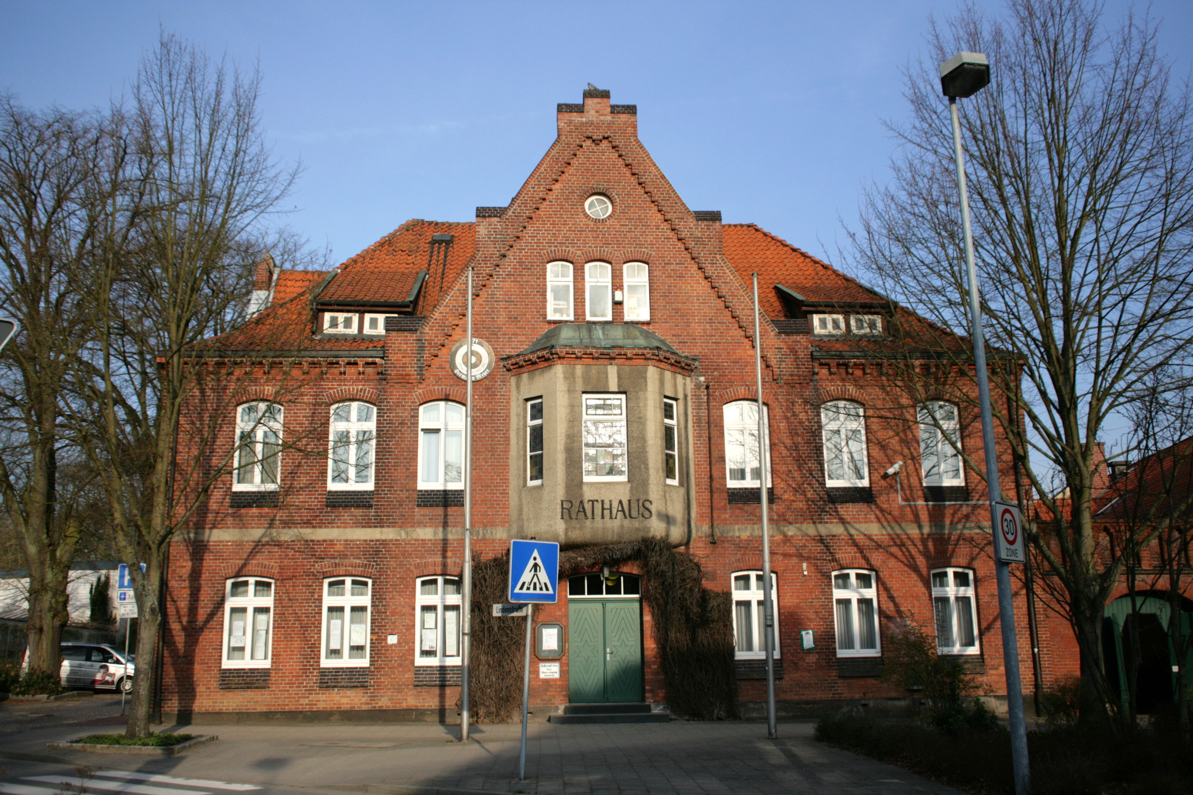 Altes Rathaus von 1869, Lindenstr. 1, Ecke Klein Bünstorfer Straße in Bad Bevensen